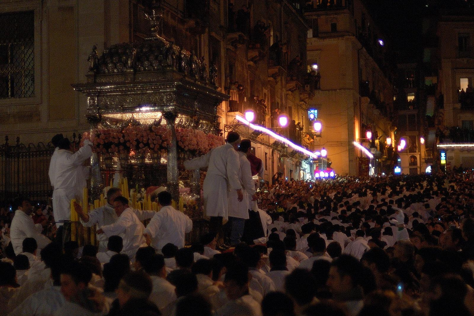 la salita dei cappuccini